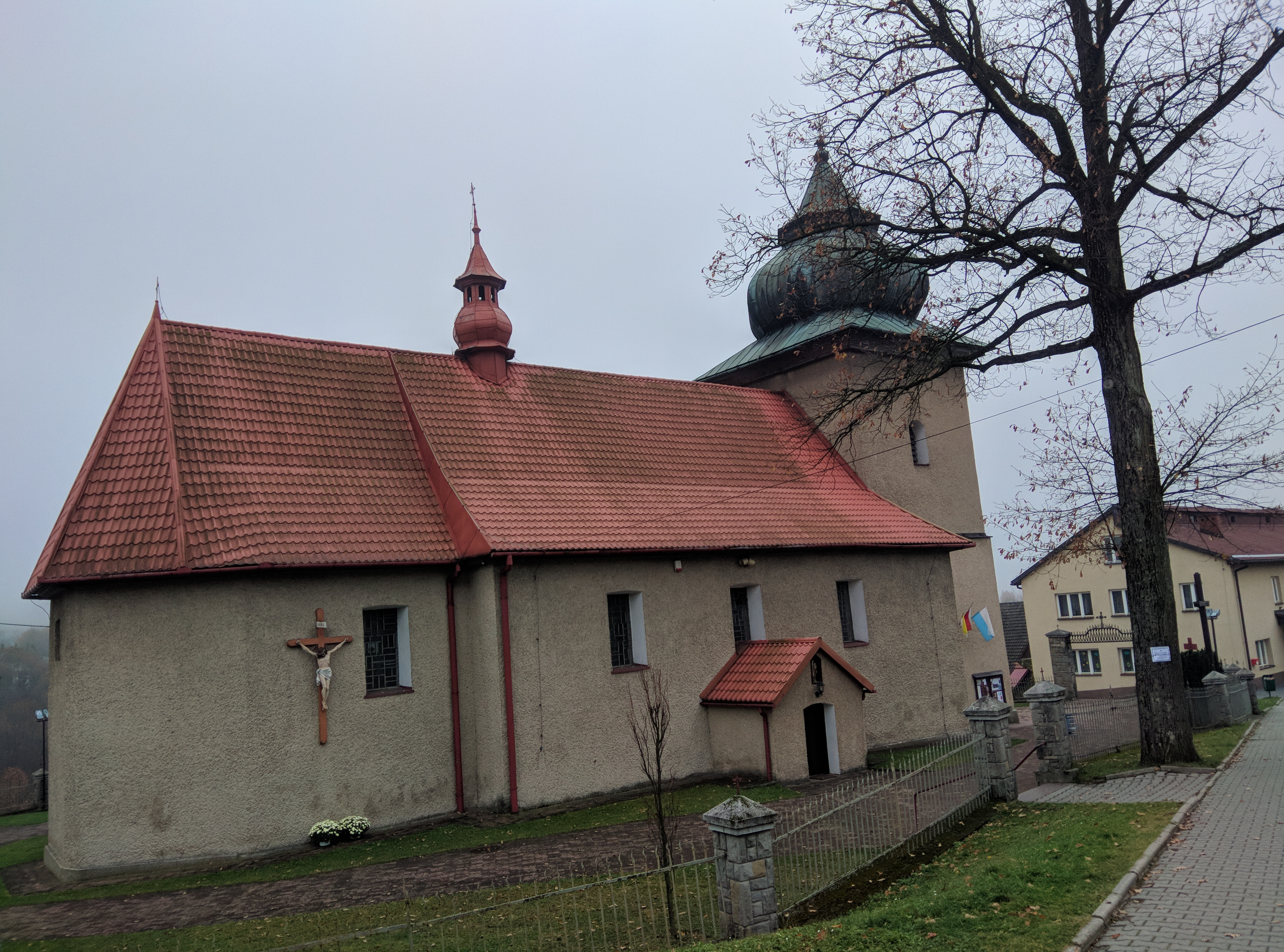 Kościół rzymskokatolicki pw. Przenajświętszej Trójcy w Bieńkówce